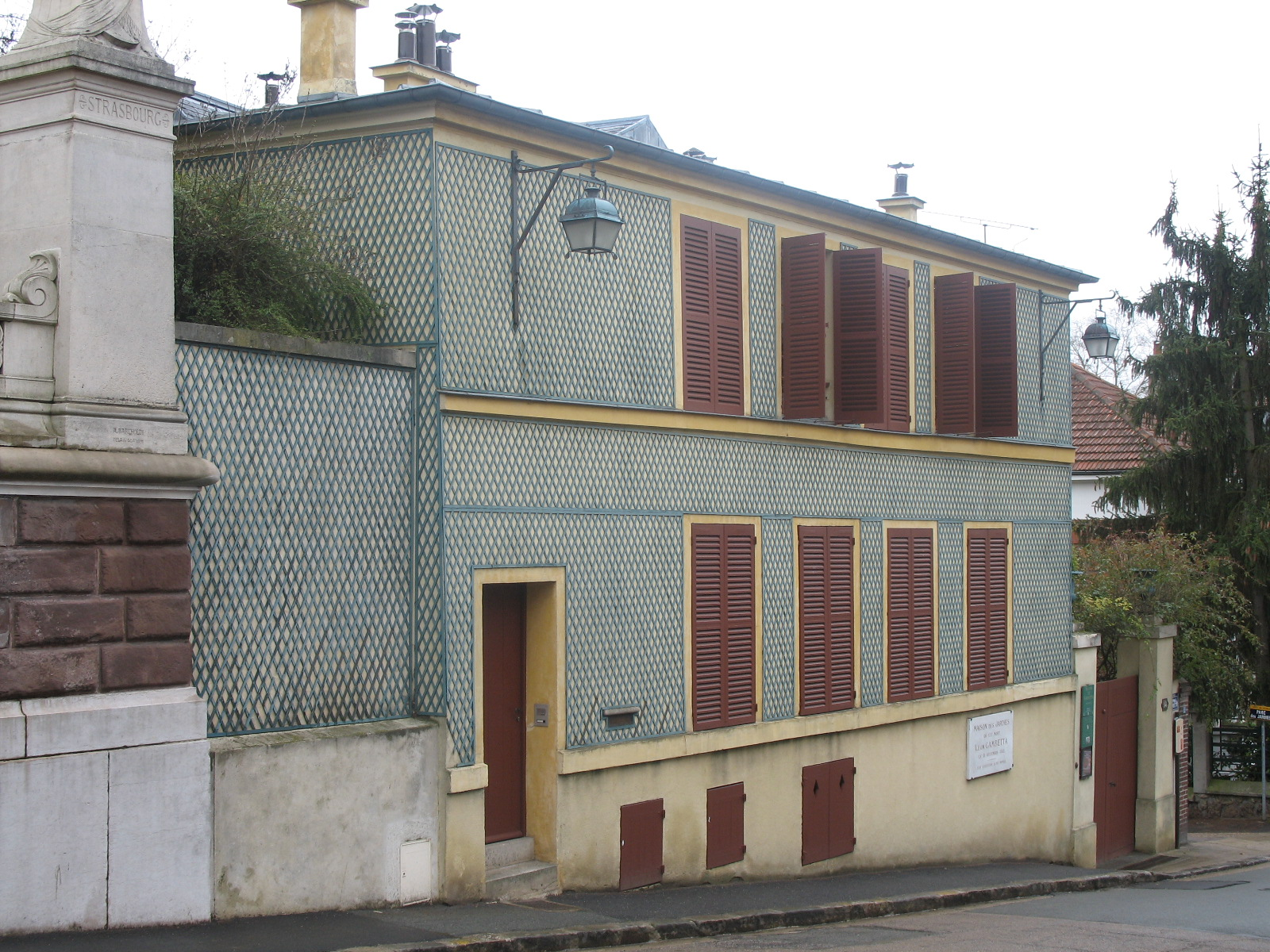 Maison des Jardies. It is indexed in the Base Mérimée, a database of architectural heritage maintained by the French Ministry of Culture, under the references IA92000524 and PA00088175.